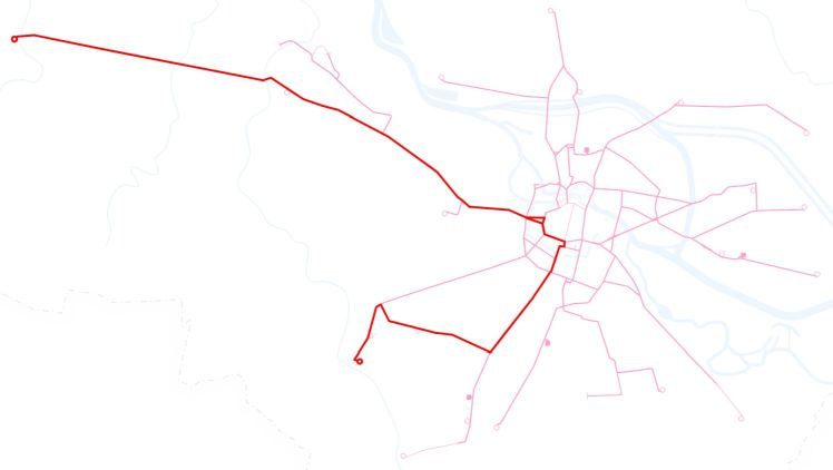 Poglądowa mapka przebiegu linii tramwajowej 20 we Wrocławiu.